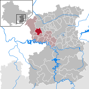 Ranis in Thuringia - Saale-Orla-Kreis